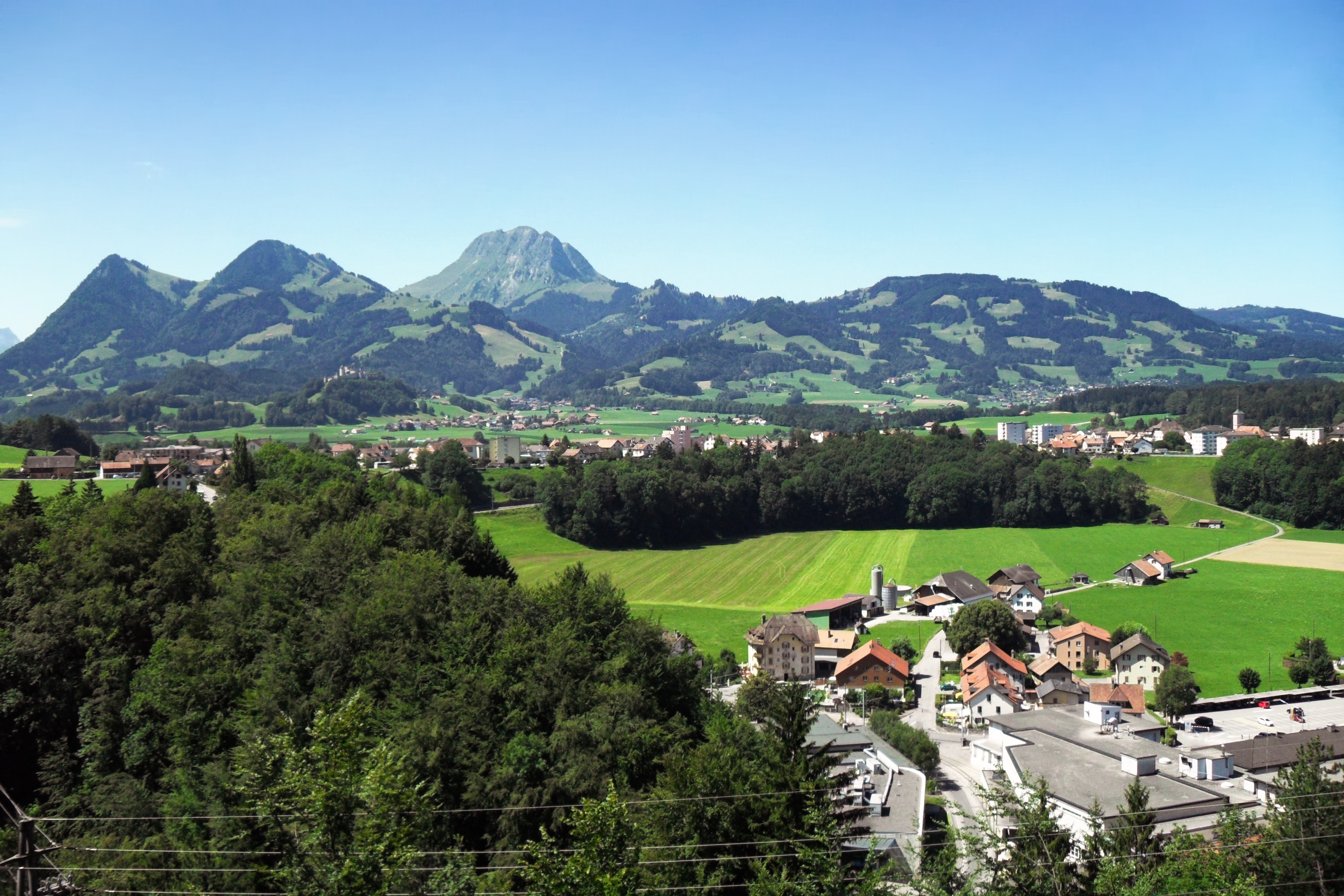 Vu sur Broc